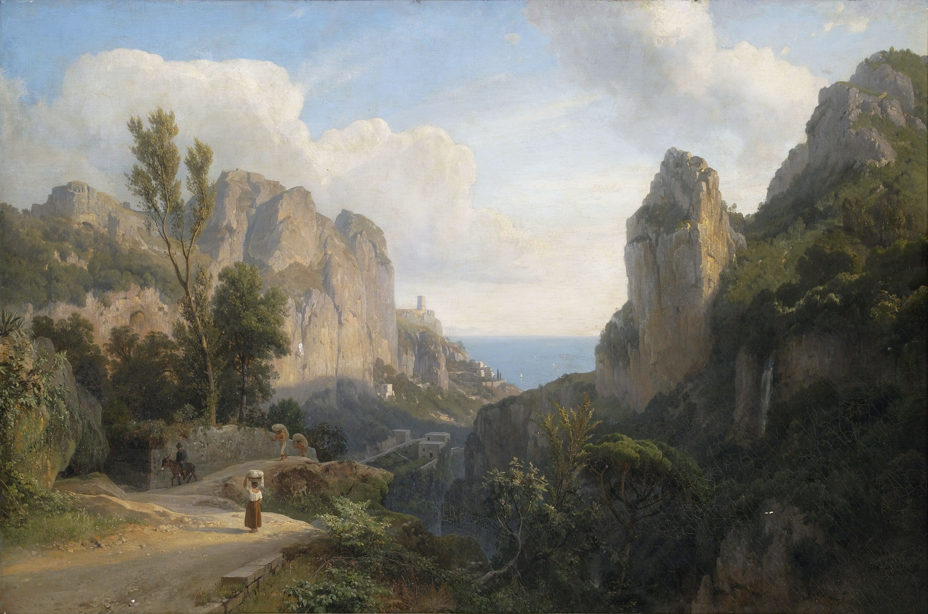 Das Mühlental bei Amalfi. Öl auf Leinwand, unten rechts signiert und datiert "1878". 102 x 154 cm